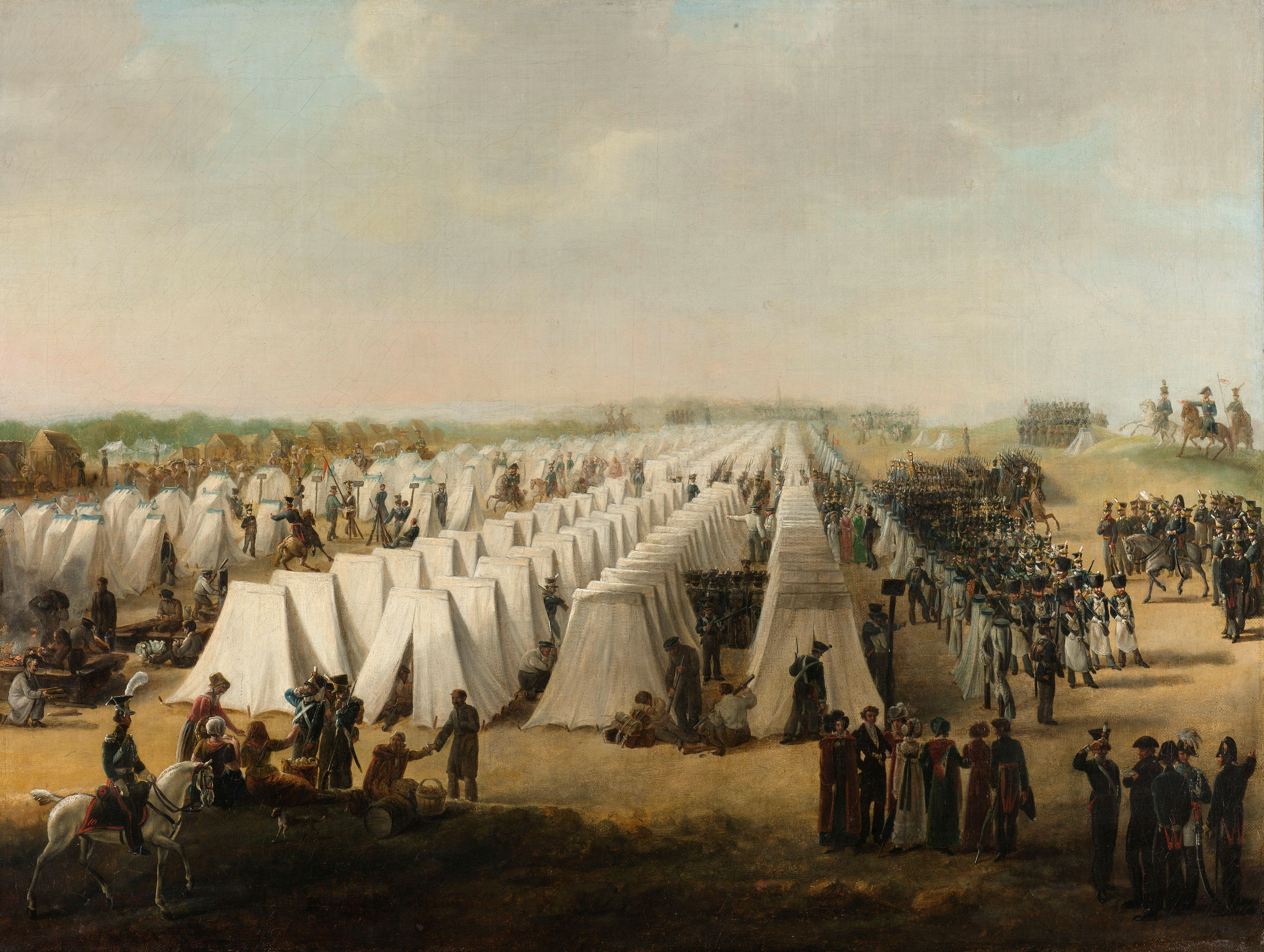 Legerkamp van Nederlandse troepen te Rijen, in of na de Tiendaagse Veldtocht in 1831. Lange rijen witte tenten, rechts marcherende soldaten, op de voorgrond enkele bezoekers.; Nederland?, 1831-1835, olieverf op doek